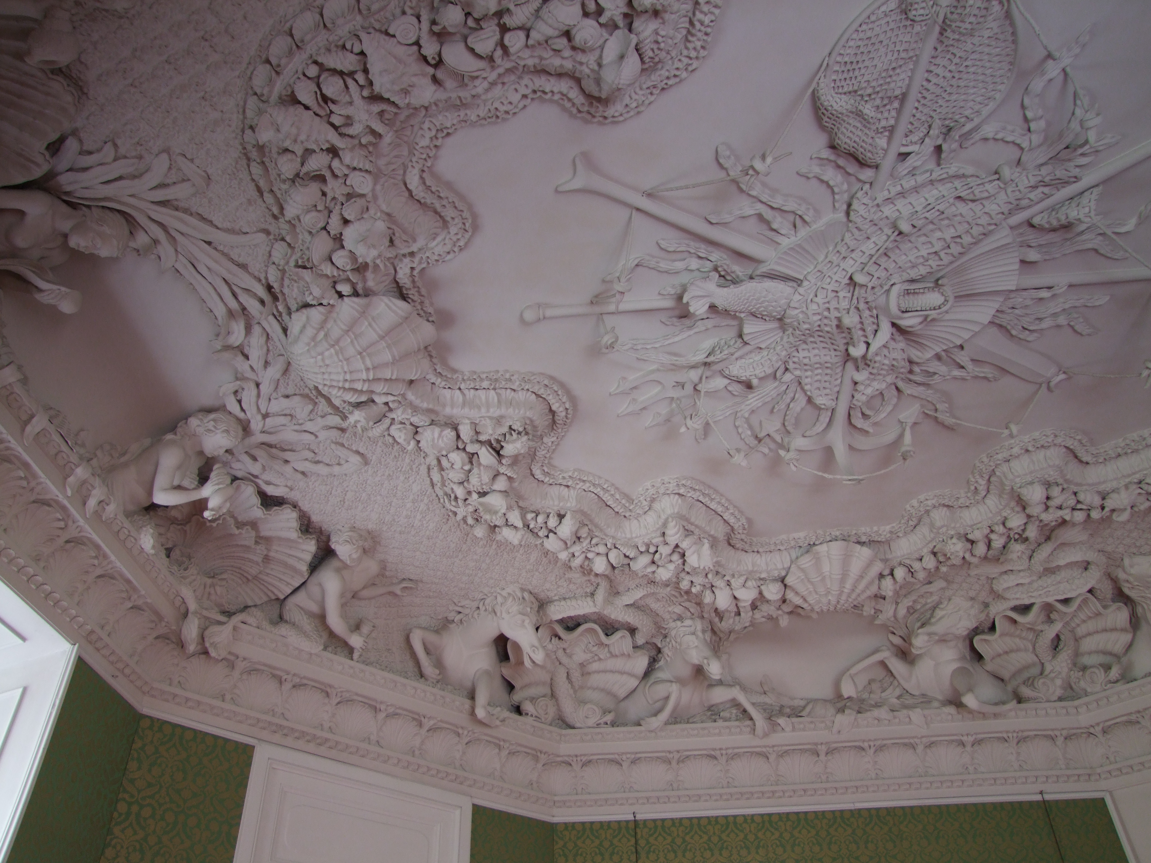 Rydzyna, ul. Zamkowa - zespół zamkowy z XVII-XVIII, XX w.: zamek (zabytek nr 52)